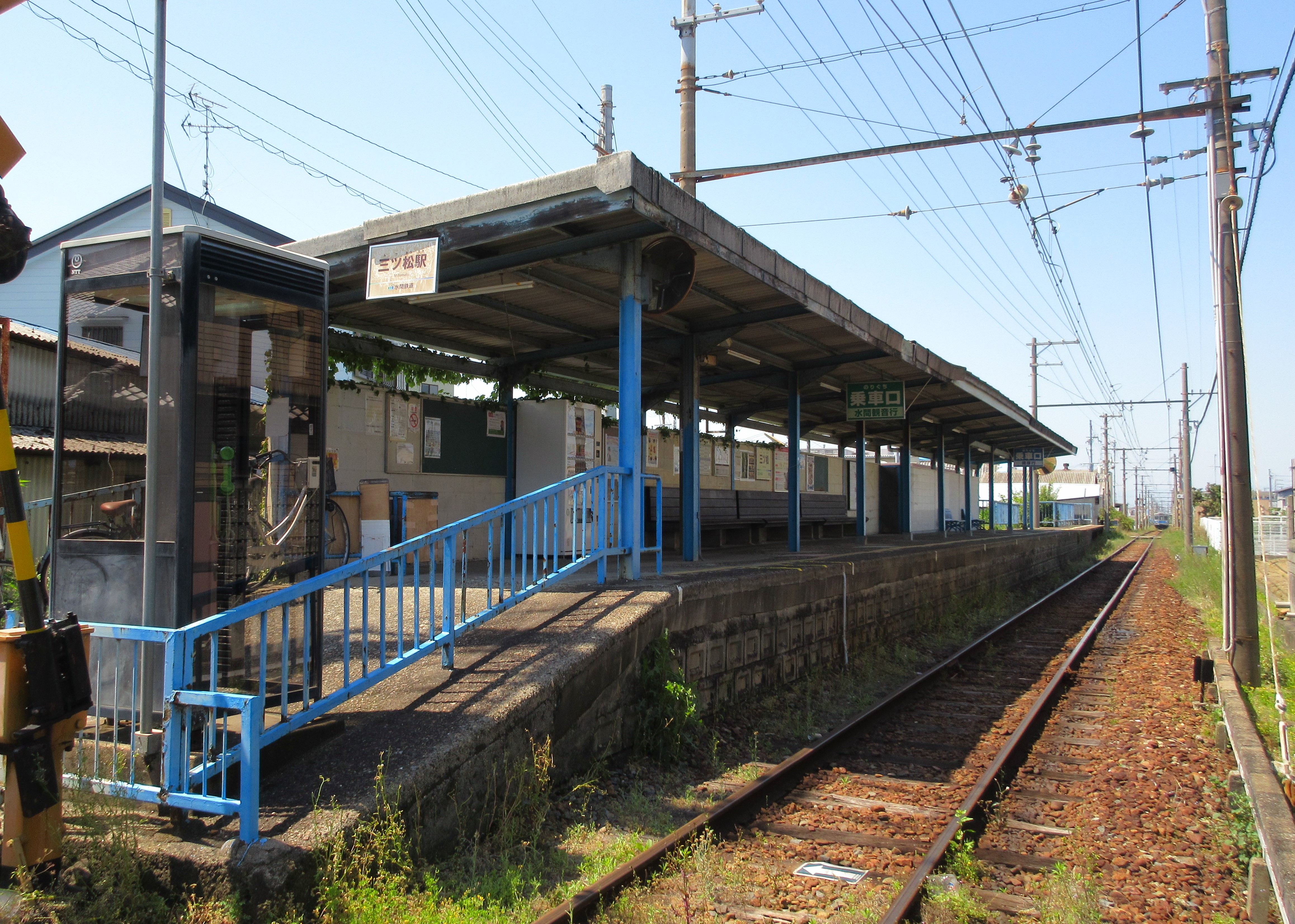 水間鉄道三ツ松駅